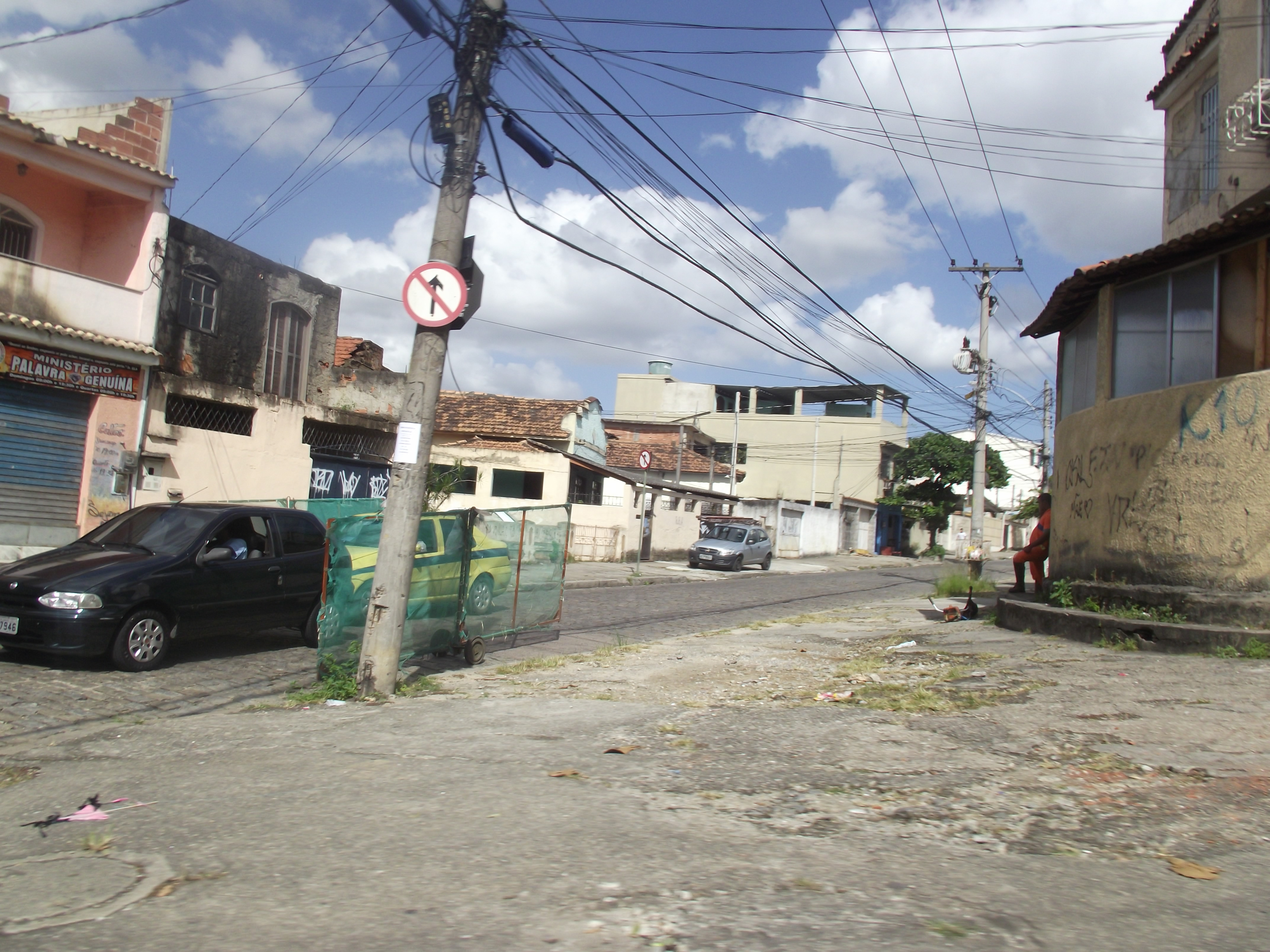 Vista do bairro suburbano de Bento Ribeiro, no Rio de Janeiro, Brasil.